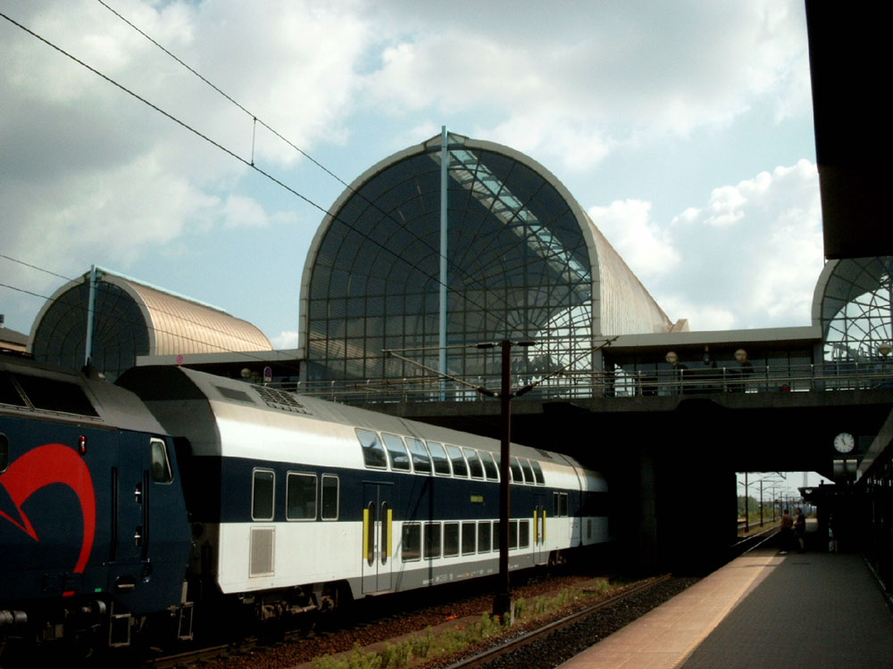 Høje-Taastrup train station in Høje Taastrup, Denmark. Photographer: Dan Simon